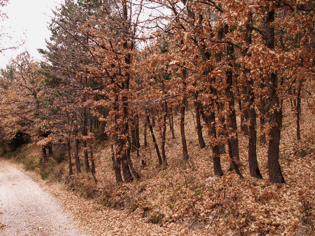 Rebollar_del_atardecer